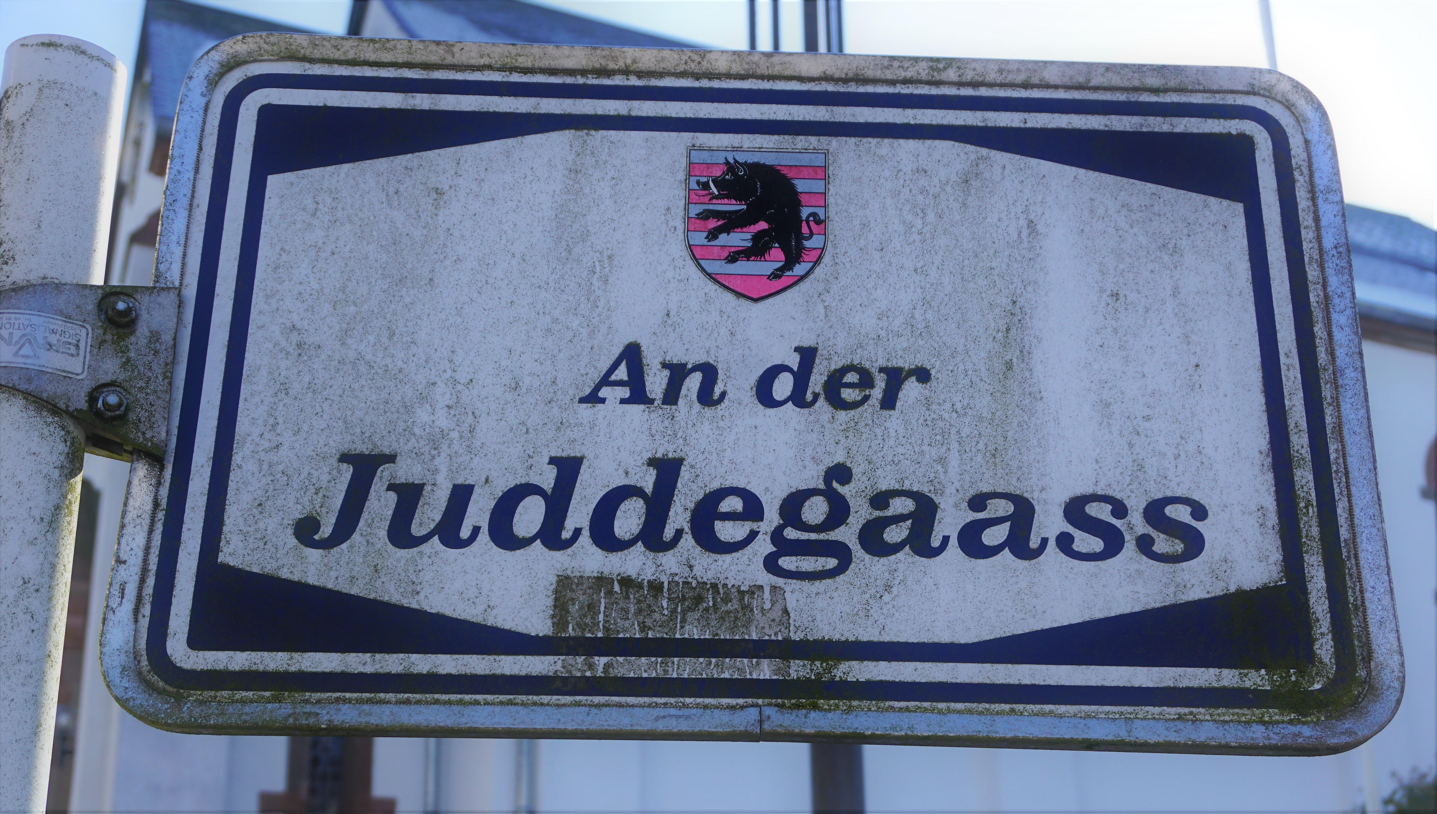 Plaque de nom de rue à Eschdorf. An der Juddegaass (ruelle des juifs).